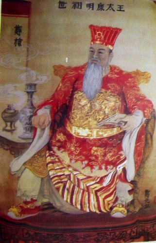 Trịnh Kiểm (chữ Hán: 鄭檢, 1503 – 1570) là người mở đầu sự nghiệp nắm quyền của họ Trịnh và gián tiếp tạo nên tình trạng vua Lê - chúa Trịnh tại Bắc Hà (miền Bắc Việt Nam ngày nay) cũng như là đầu mối của chiến tranh Trịnh-Nguyễn sau này. Đương thời khi cầm quyền ông không xưng là chúa nhưng được đời sau truy tôn là Thái Vương. Ông là người nắm quyền chỉ huy quân đội trong triều các vua Lê thời Nam Bắc triều từ năm 1545 tới khi mất (tháng 2 năm Mậu Ngọ, 1570).